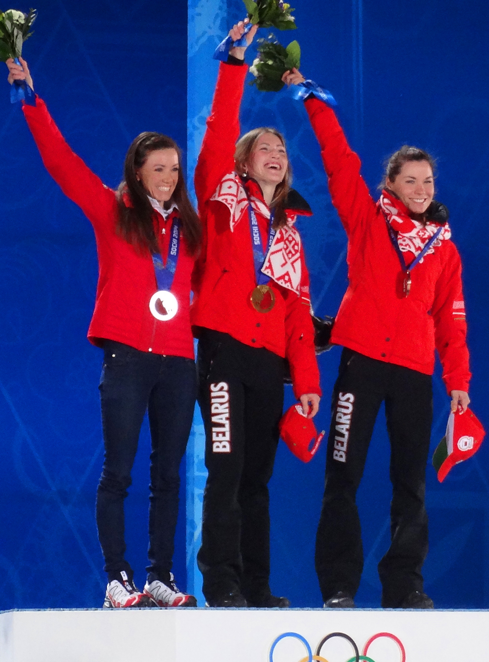 Индивидуальная гонка на 15 километров среди женщин в биатлоне на зимних Олимпийских играх 2014 года прошла 14 февраля. В соревнованиях приняли участие 82 спортсменки из 32 стран. Местом проведения гонки стал лыжно-биатлонный комплекс «Лаура». Второе олимпийское золото в Сочи завоевала Дарья Домрачева. Бронзовую медаль получила ещё одна белорусская спортсменка — Надежда Скардино. Серебряный призёр — Селина Гаспарин.